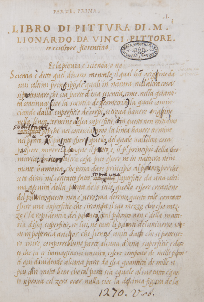 Экземпляр Трактата о живописи в Апостольской библиотеке Ватикана